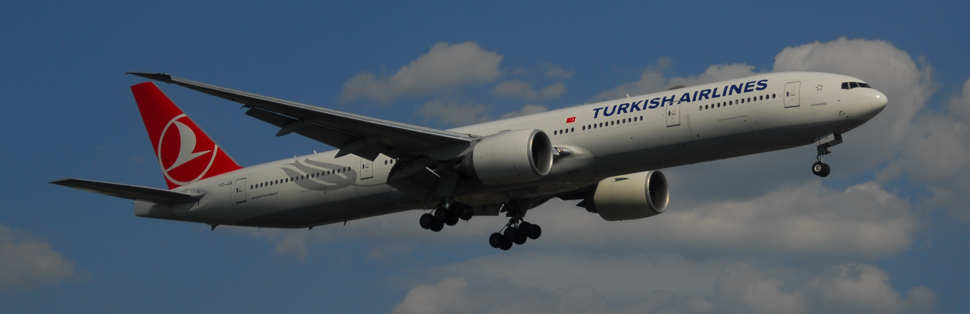 DSC_0144 cropped